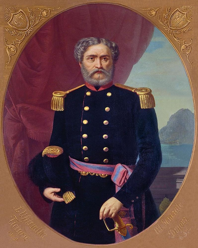 Giacomo Luvini-Perseghini. Der Maler stellt Luvini-Perseghini als eidgenössischen Oberst in Uniform dar. Auf dem Goldrahmen steht: Das Tessiner Offizierskorps 1863 – für General Dufour. Das offzielle Porträt ist erst nach dem Tod des Tessiner Obersten gemalt und dem Genfer General gewidmet worden. In den oberen Ecken sind die Wappen der Kantone Tessin und Genf zu sehen.